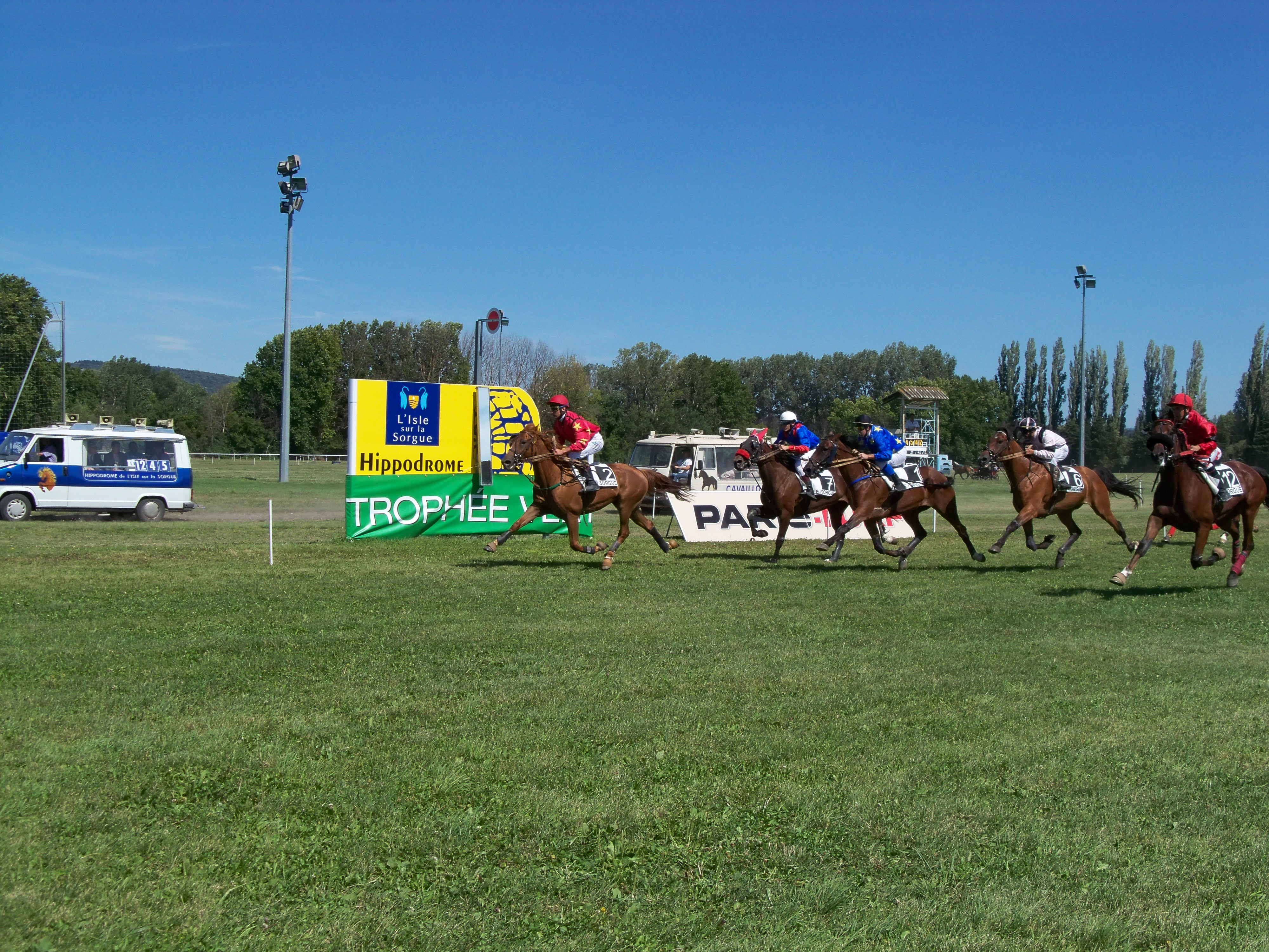 Trop à l'Hippodrome Saint-Gervais à L'Isle sur la Sorgue